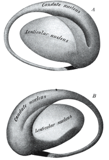 Il rapporto tra nucleo caudato e nucleo lenticolare dà una forma di un girino al nucleo della base.